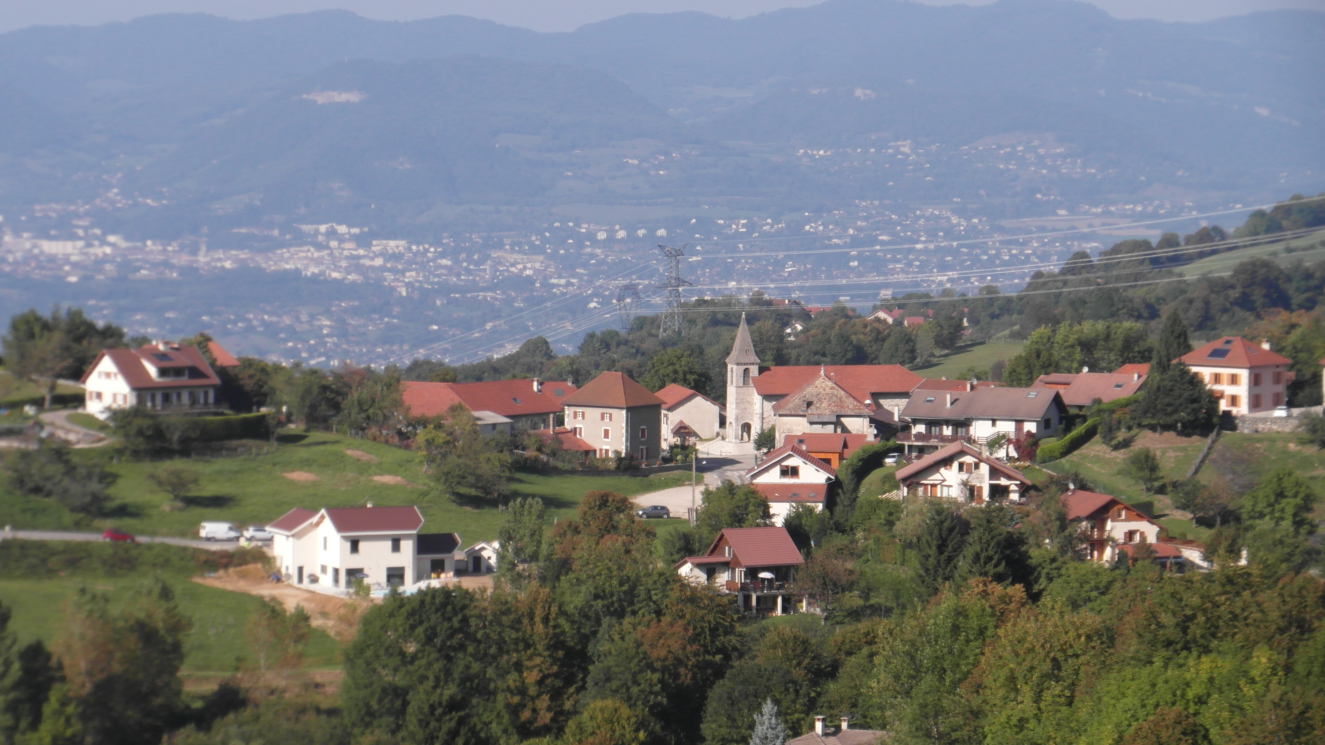 Montaud Isère